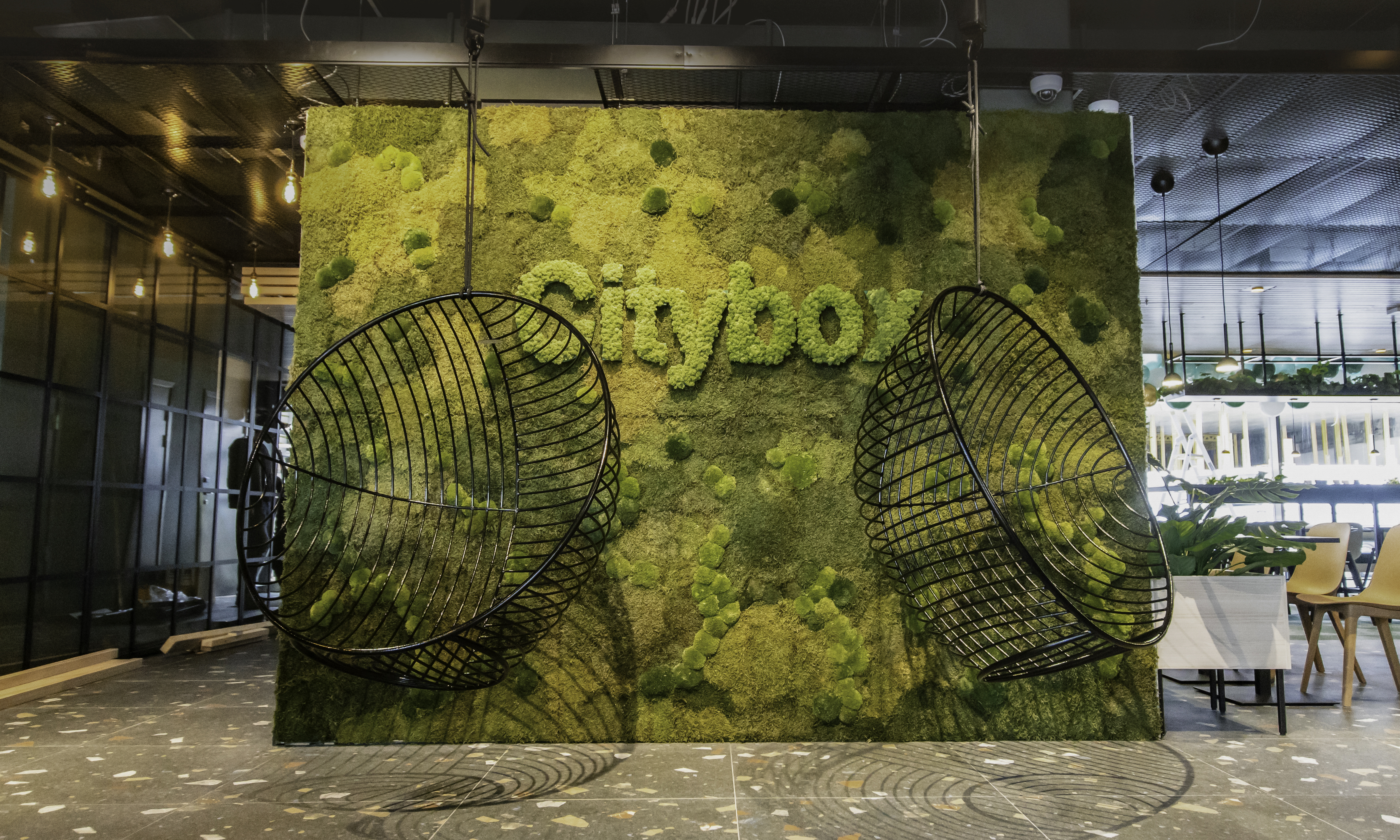 Bilde av Citybox logo i mosevegg